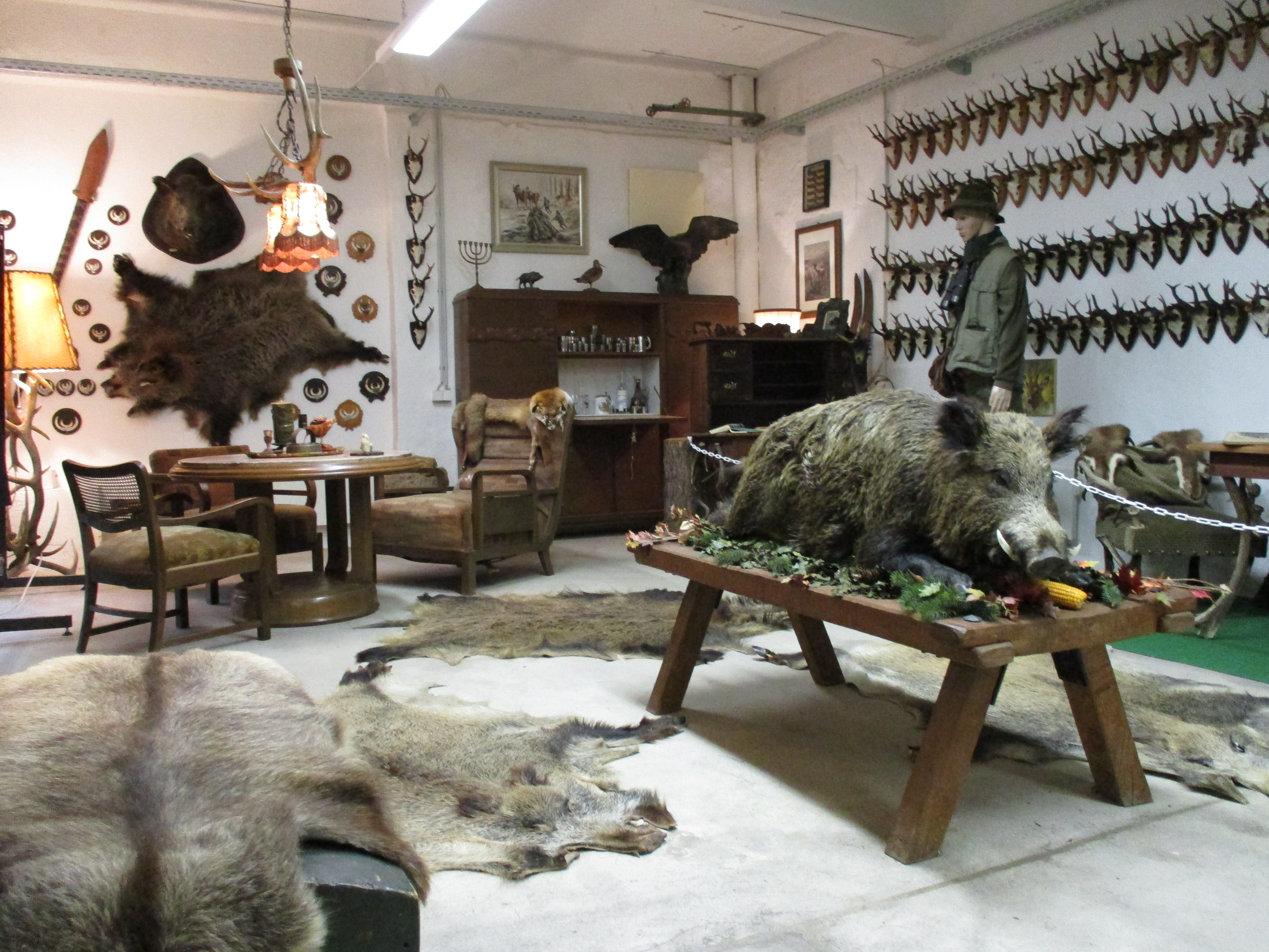 Ausstellung Jagdmuseum Schalksmühle mit Jägerzimmer und zahlreichen Präparaten.